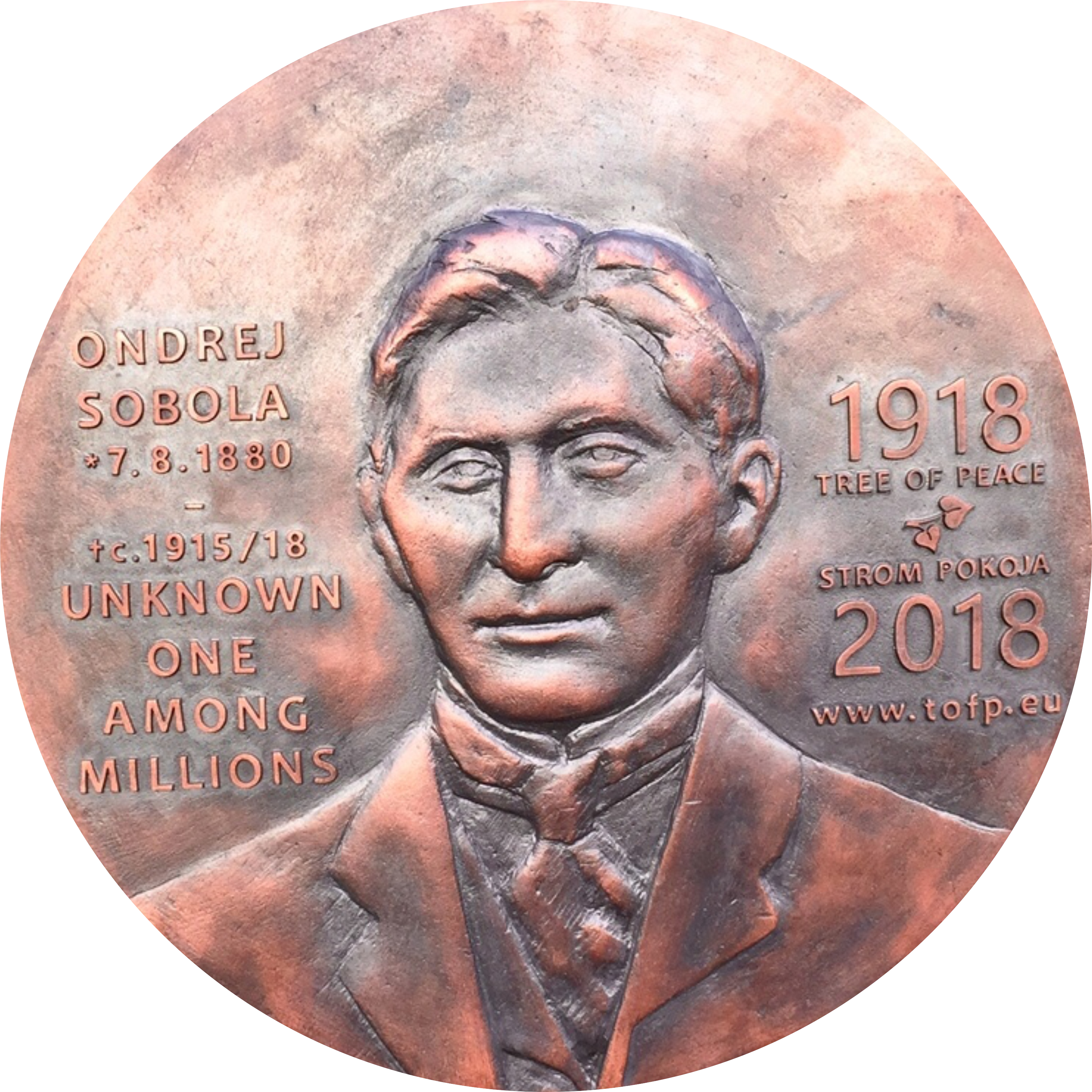 portrét